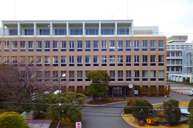 加藤学園高等学校A棟（校地南側隣接建物より撮影）